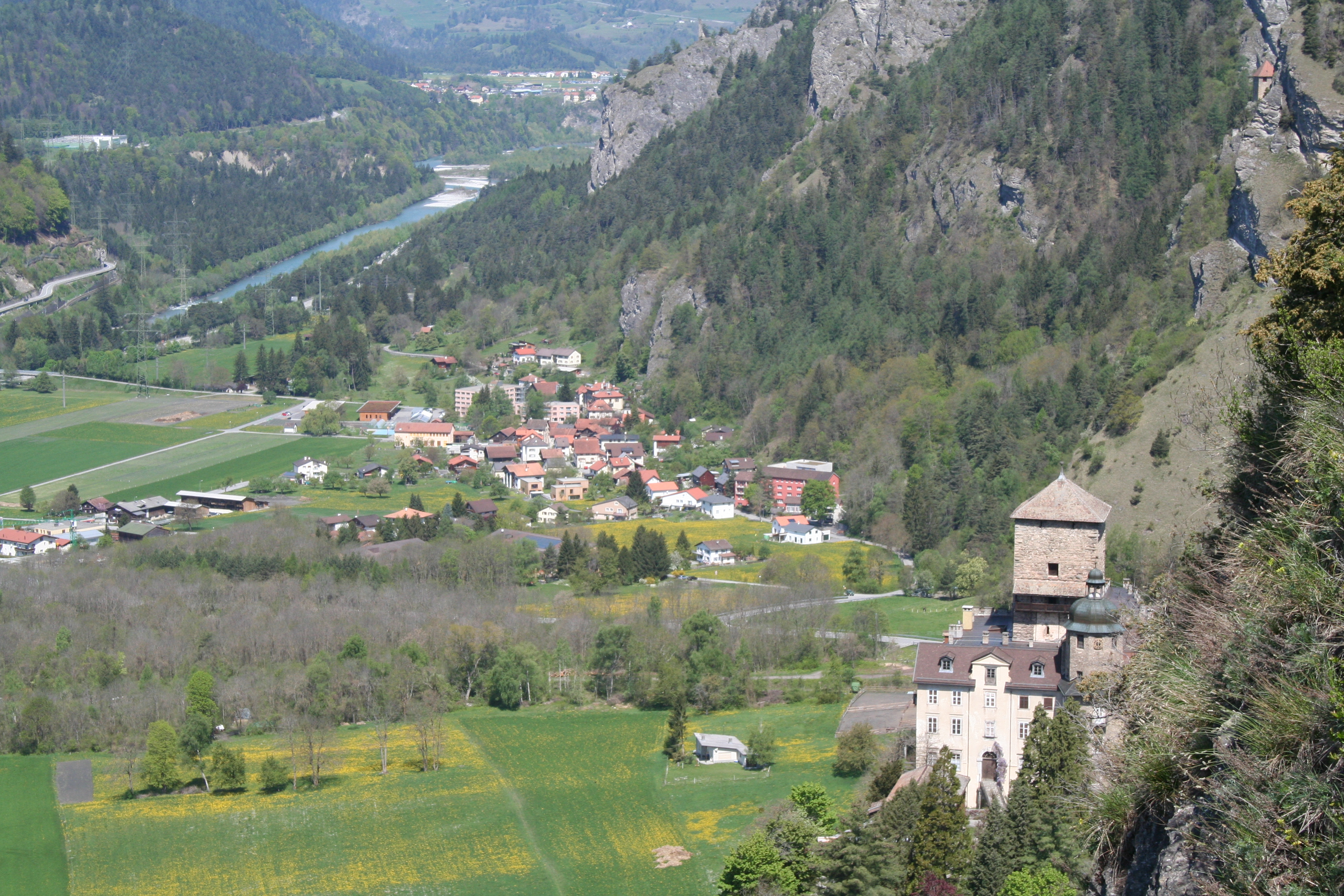 Schloss Ortenstein, Rothenbrunnen